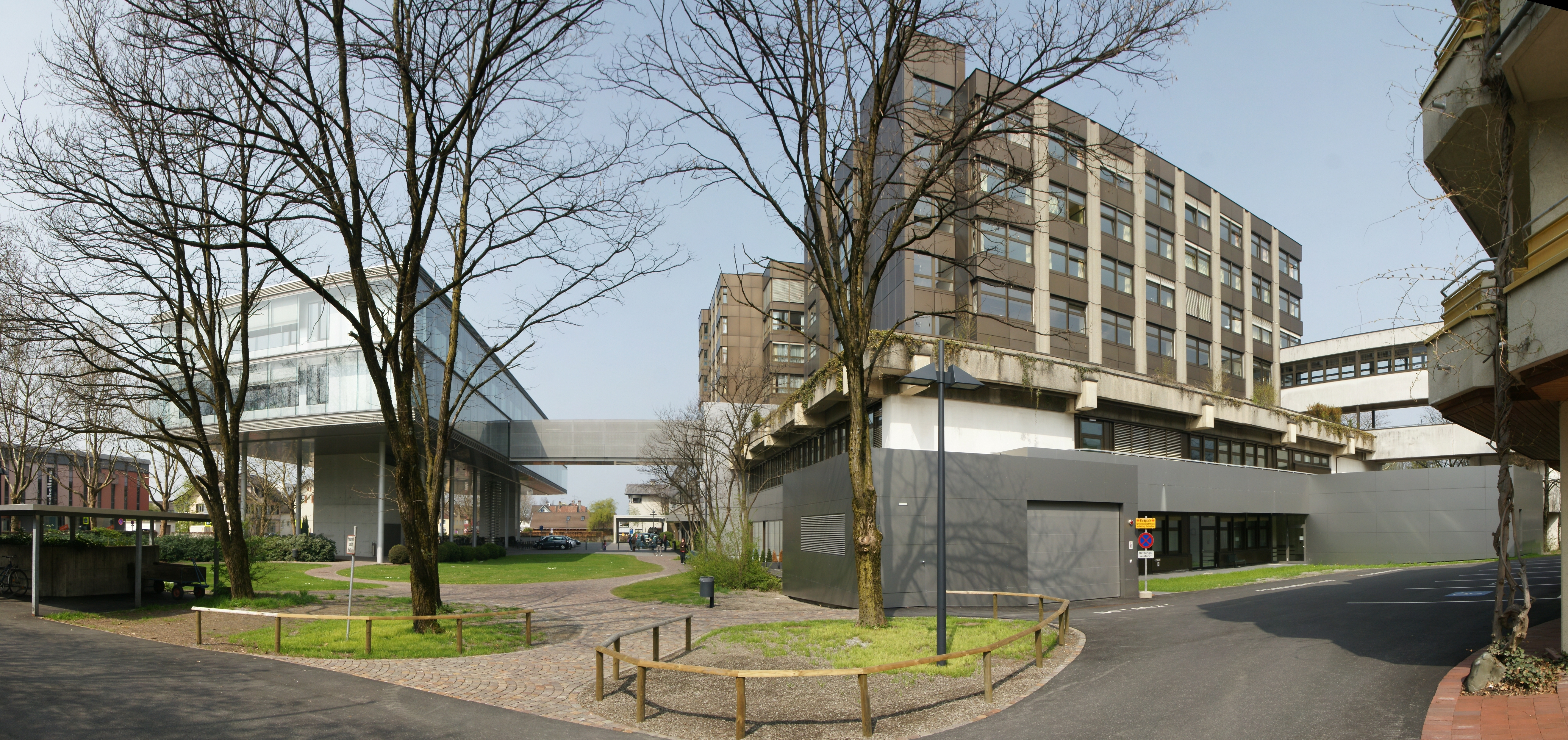 Am 1. Dezember im Jahr 1983 wurde das neue Krankenhaus der Stadt Dornbirn im Bezirk Hatlerdorf eröffnet.